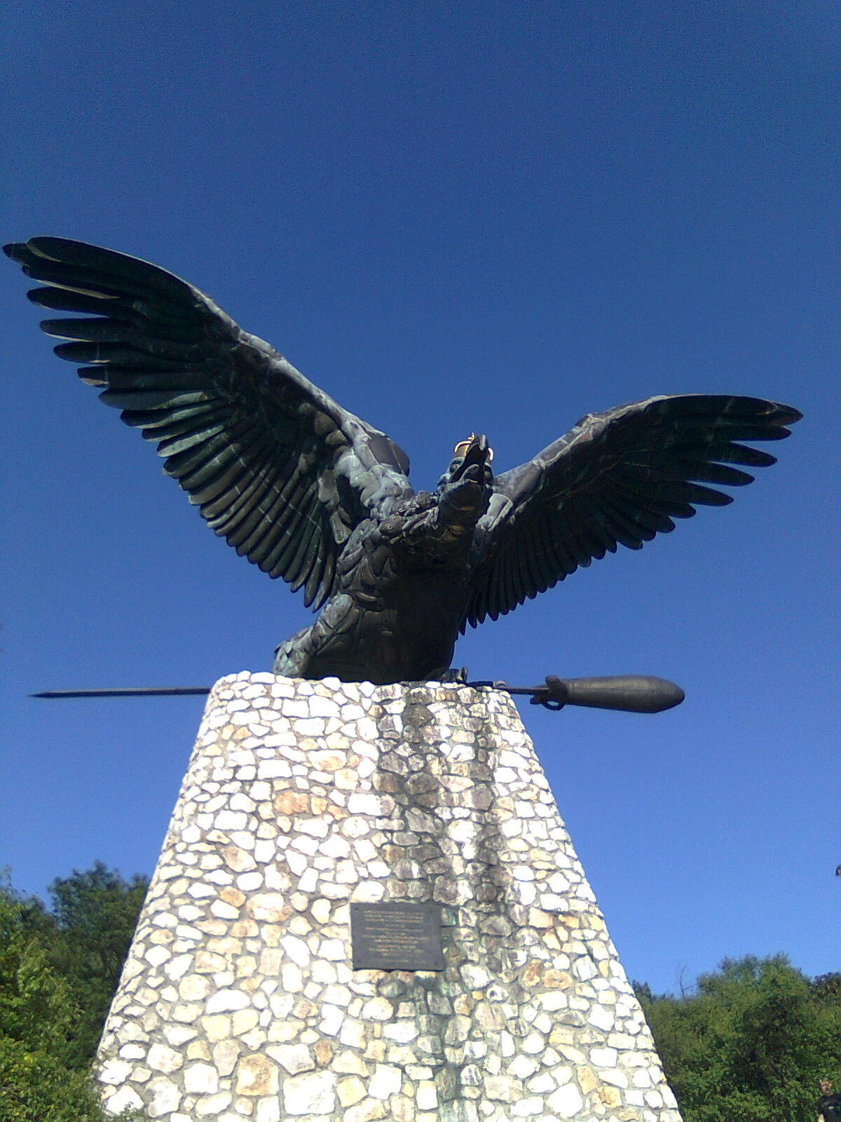 A tatabányai Turul-emlékmű